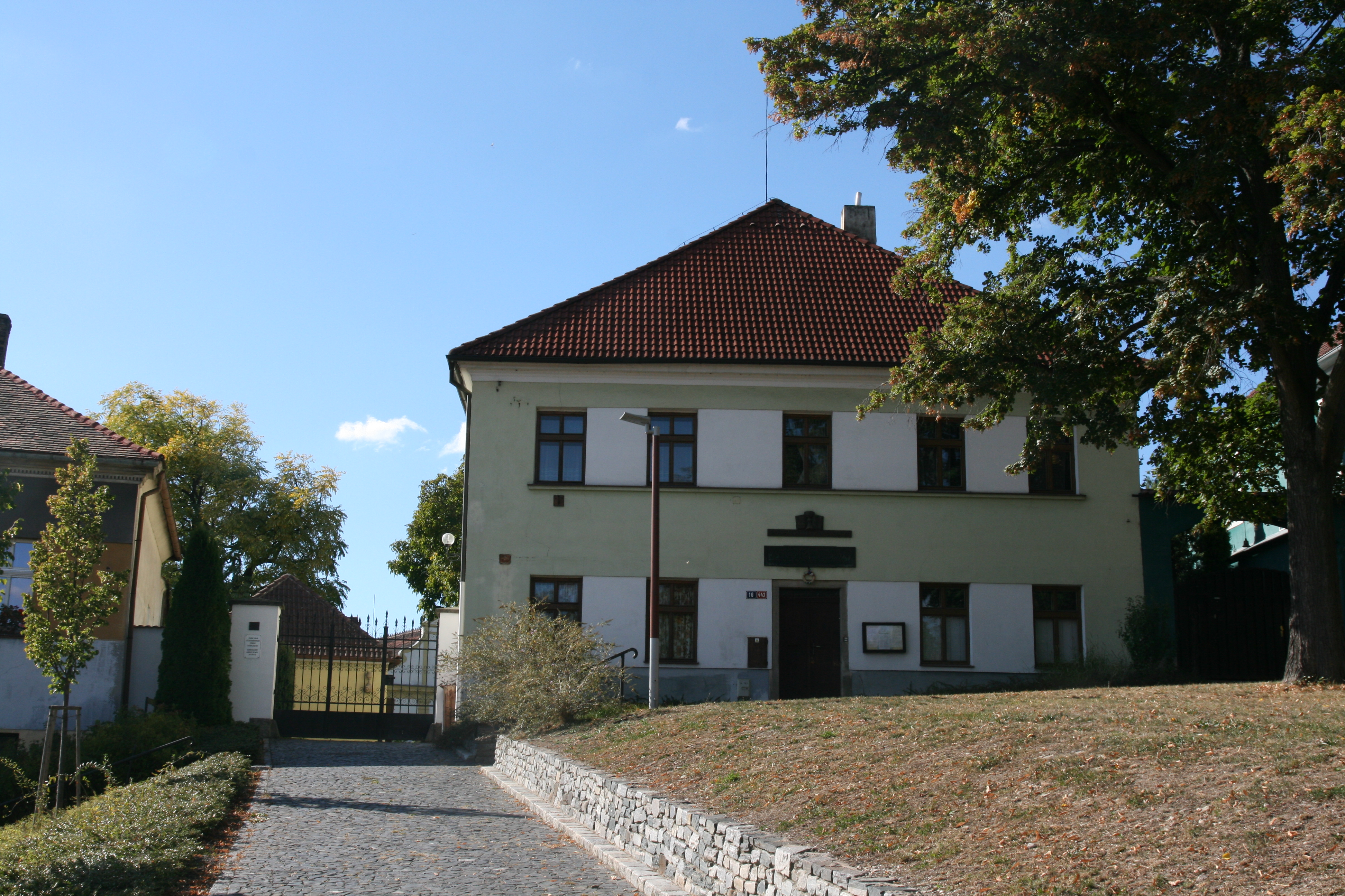 Sbor českobratrské církve evangelické v Lysé n. L. Rodný dům Bedřicha Hrozného